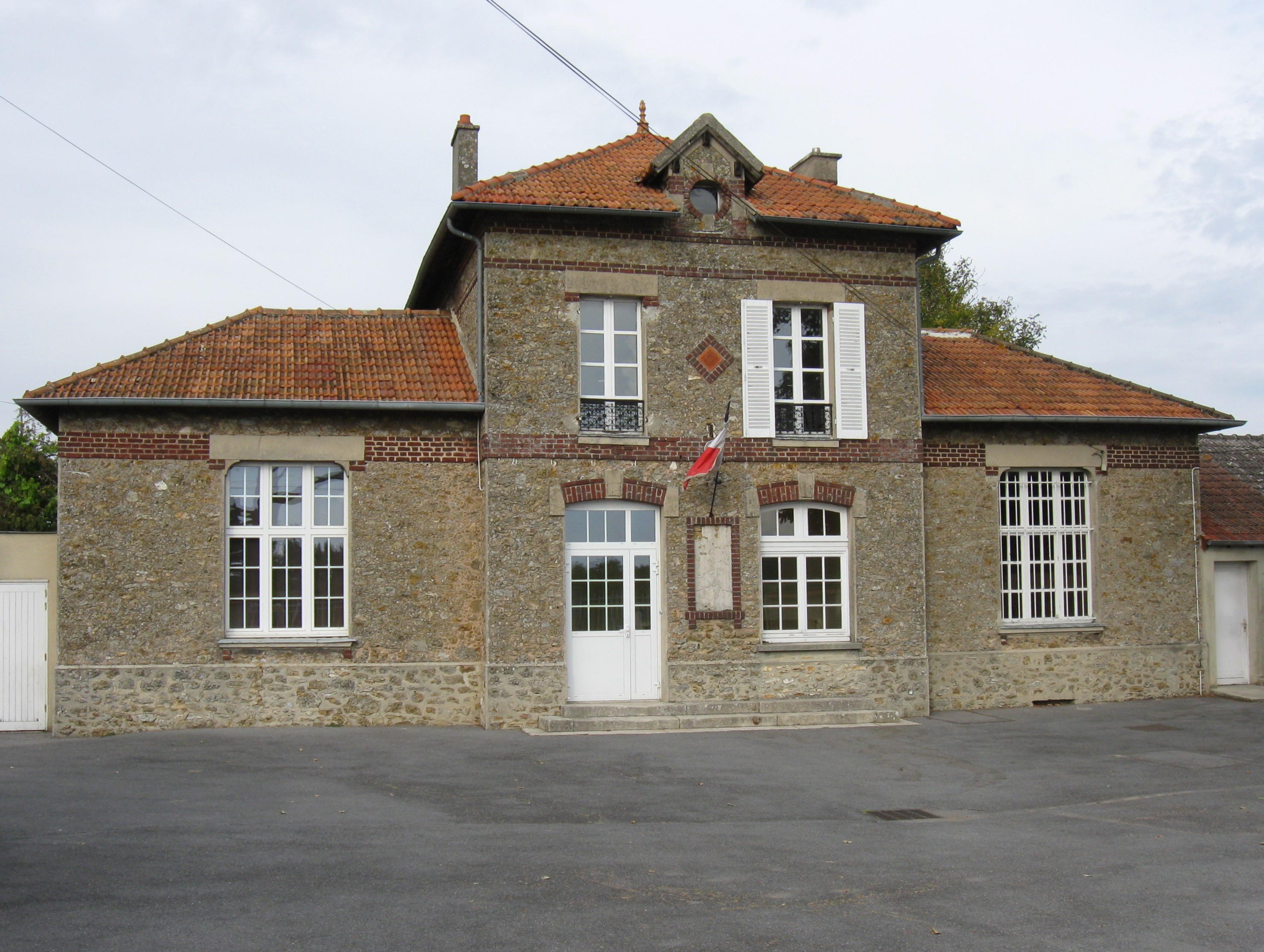 Mairie de Le Plessis-aux-Bois. (Seine-et-Marne, région Île-de-France).